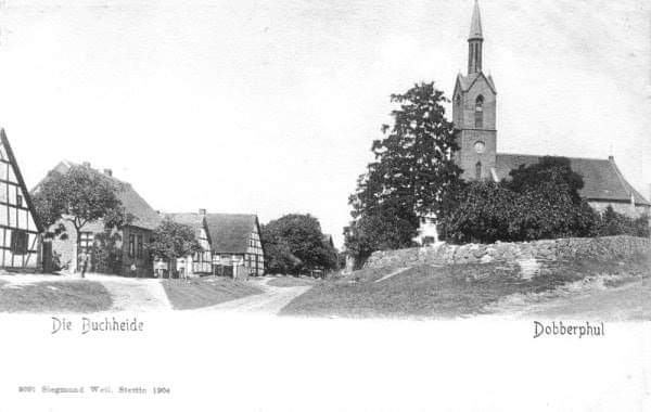 Wizytówka Dobropole Gryfińskie